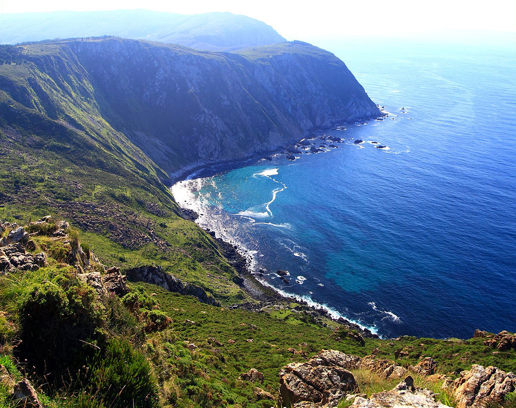 Acantilado